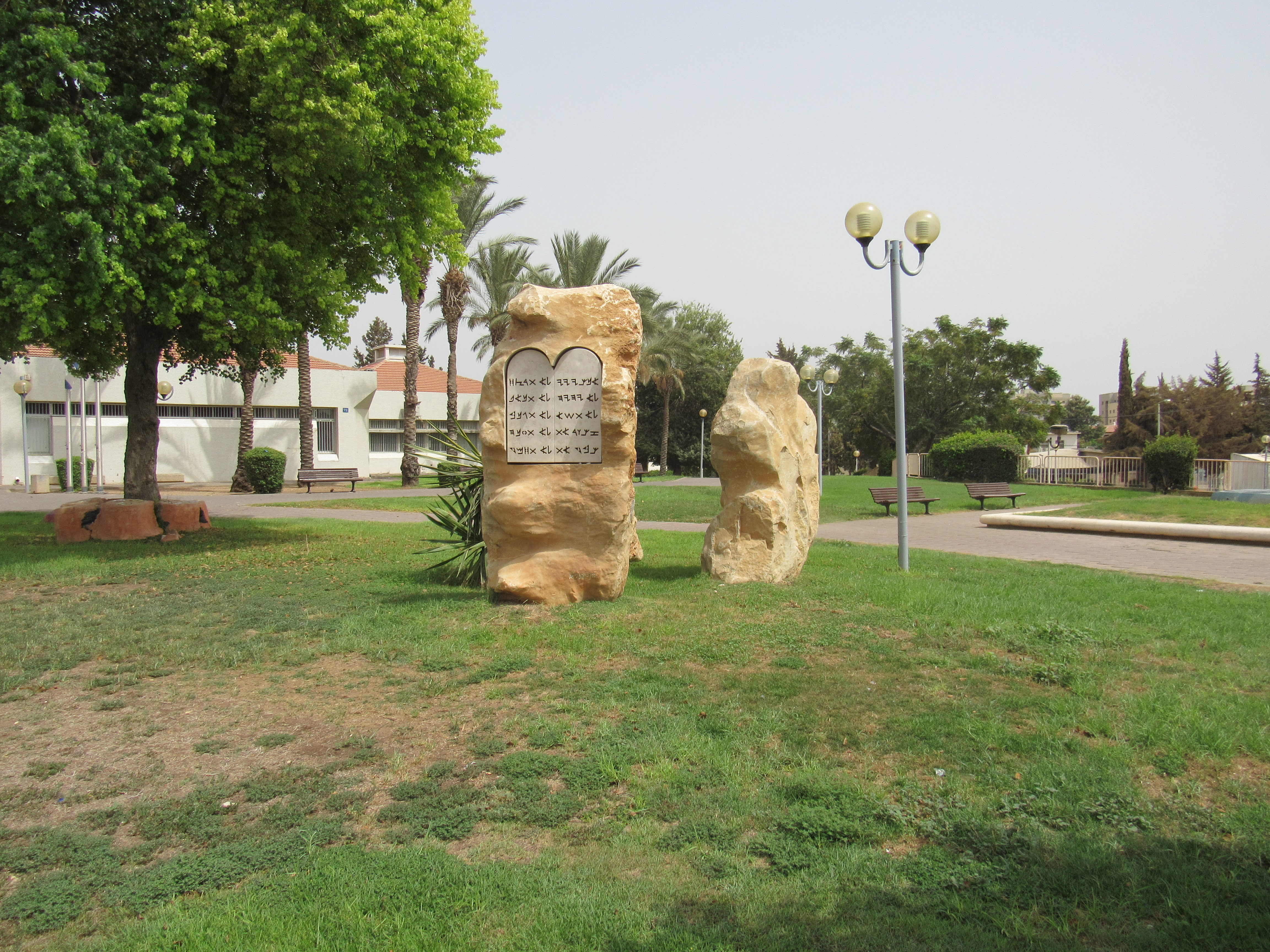 Acre